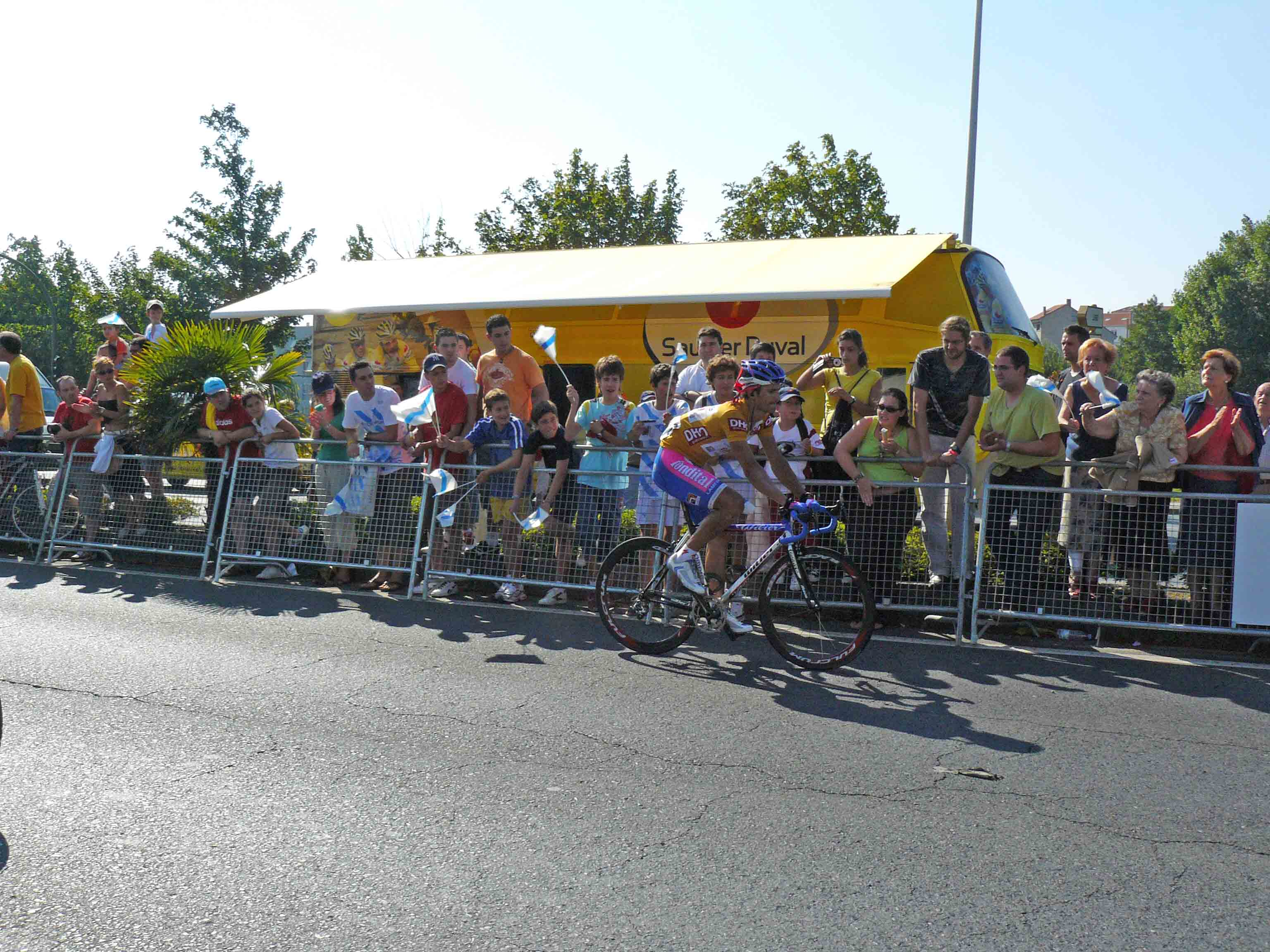 Daniele Bennati chegando de amarelo na 2ª etapa da Vuelta ciclista a España 2007, rezagado do grupo pola montoneira que tivo lugar no circuito urbano